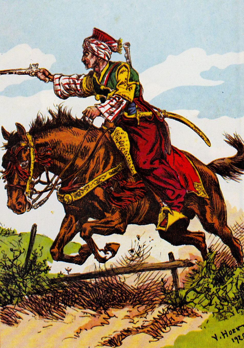 Mamelouk syrien, 1799, d'après Carle Vernet et Eugène Lami.